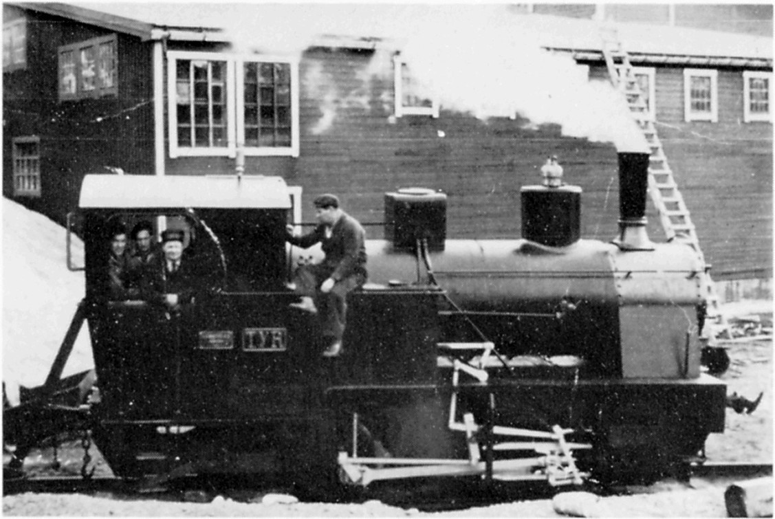 Maffei steam locomotive No 4366 named TYR after an overhaul at the Sultitjelma line in 1950